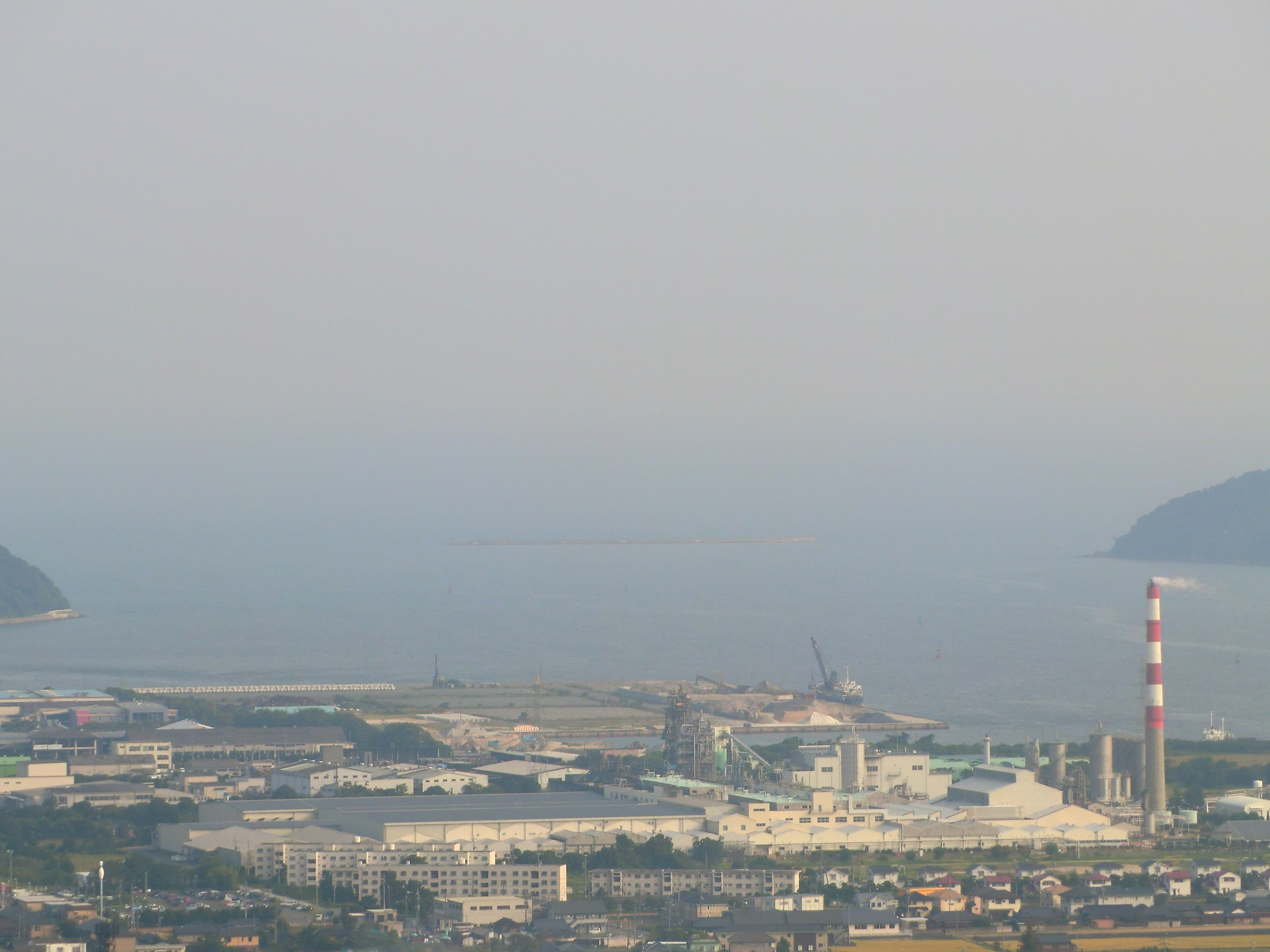 三田尻中関港の三田尻方面遠景（山口県防府市）